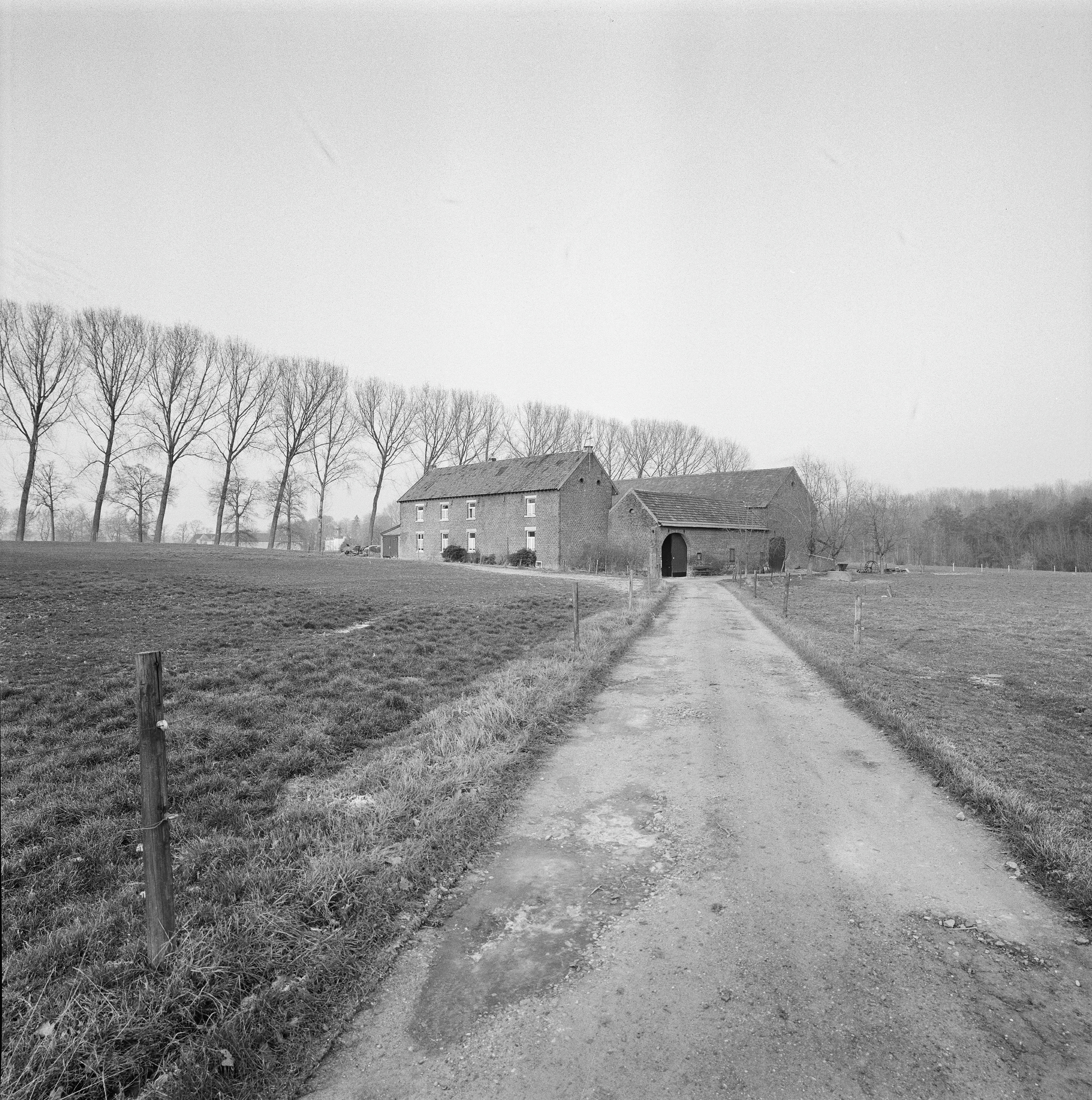 Huis Leeuw: Exterieur OVERZICHT VOORZIJDE